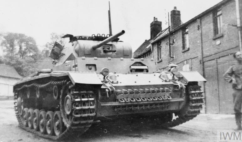 Beobachtungpanzer III, char d'observation d'artillerie, avec son canon factice.